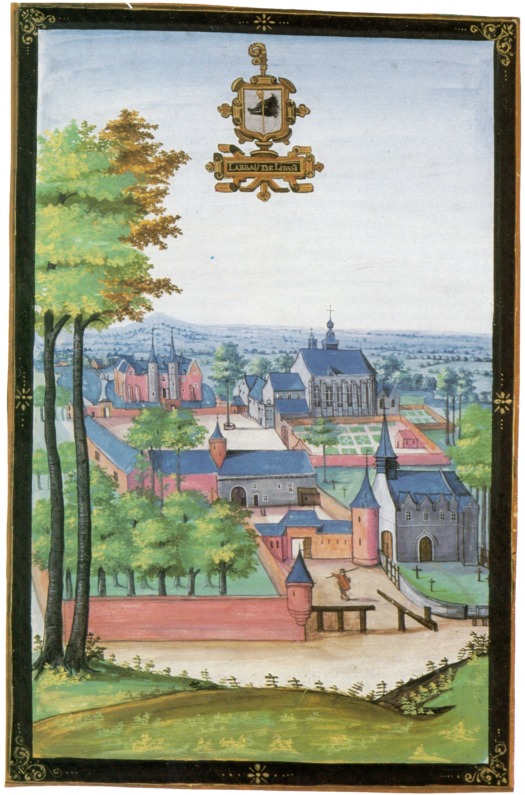 Abbaye de Liessies en 1598. Albums de Croÿ, Vienne, Österreichische Nationalbiblithek.